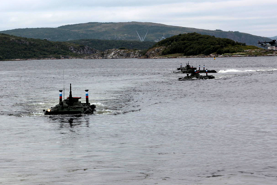 Морские пехотинцы Северного флота отработали высадку морского десанта с БДК на бронетранспортерах.